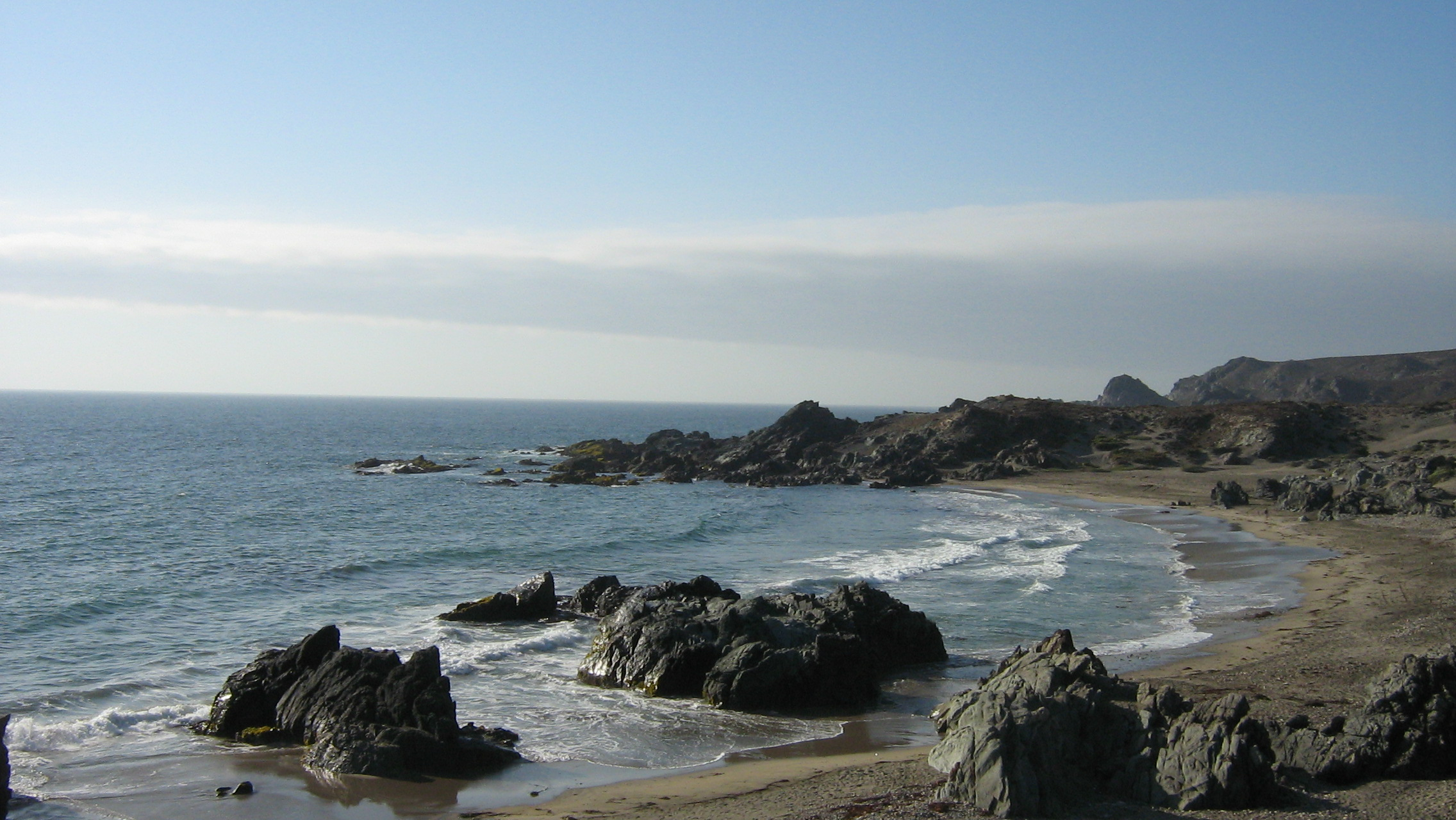 La Cebada-Playa IV Región Chile